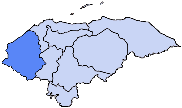 Mappa della diocesi cattolica di Santa Rosa de Copán, in Honduras.